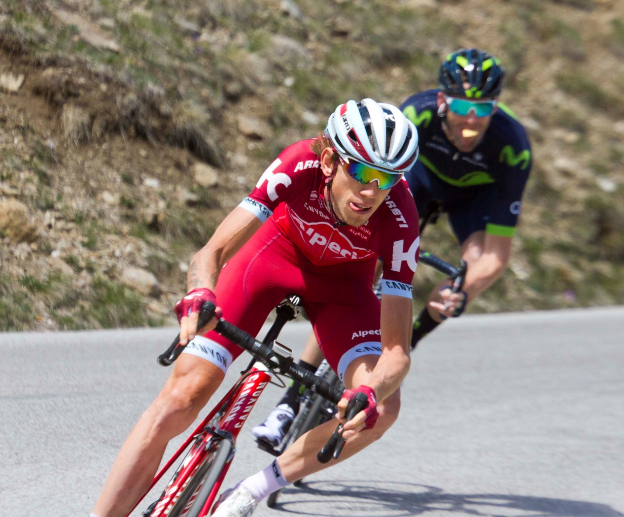 195 zakharin